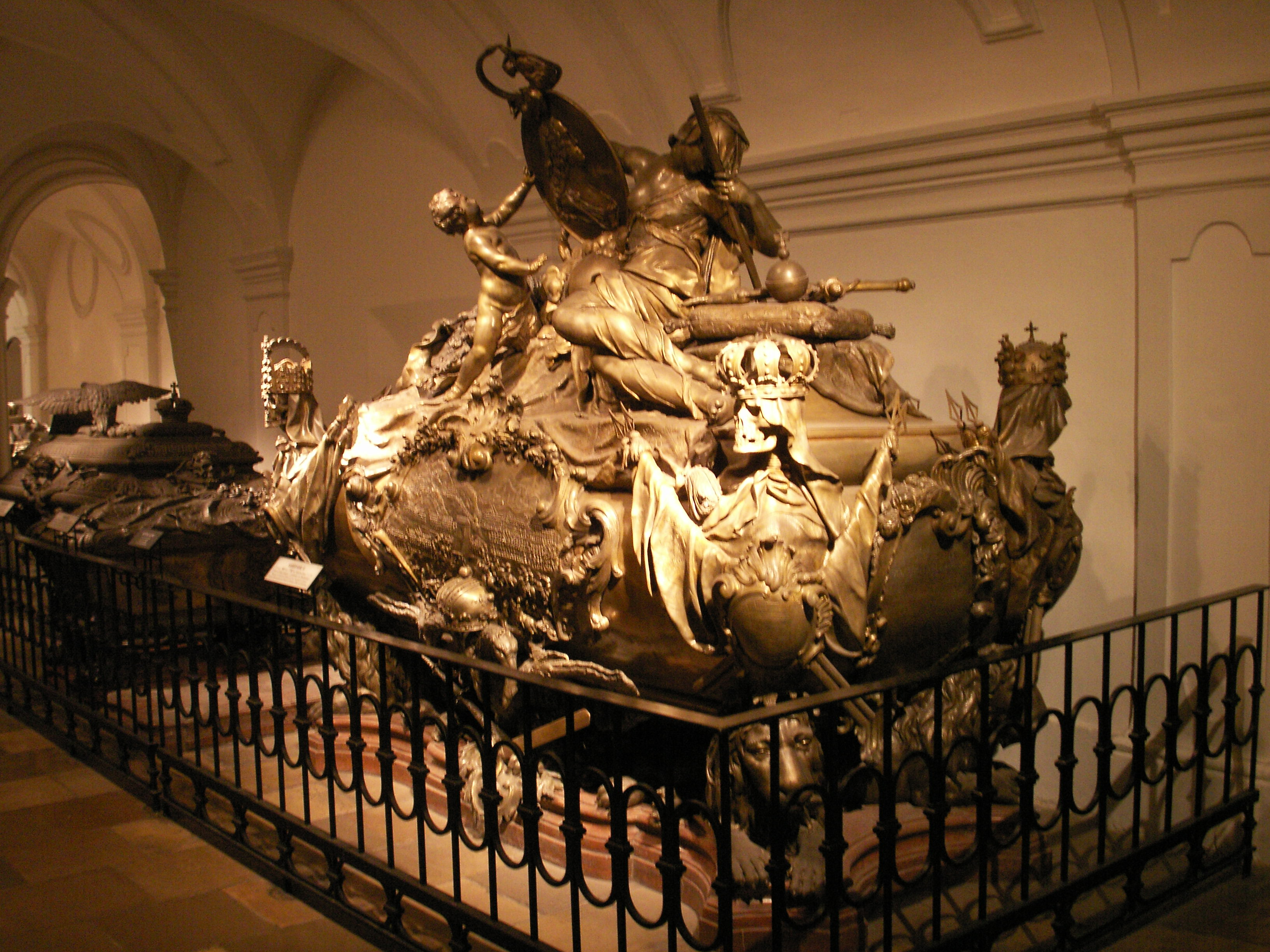 Kapuzinergruft, Wien, Sarkophag Kaiser Karl VI.